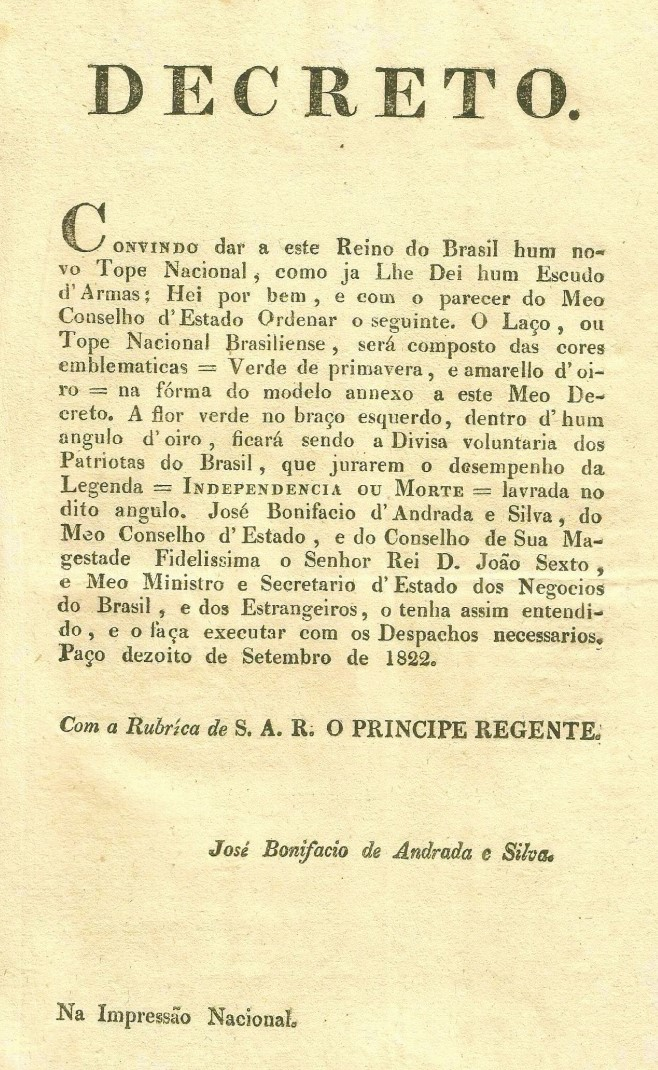 Decreto por meio do qual Dom Pedro I, do então Reino do Brasil, cria o Laço Nacional do Brasil.